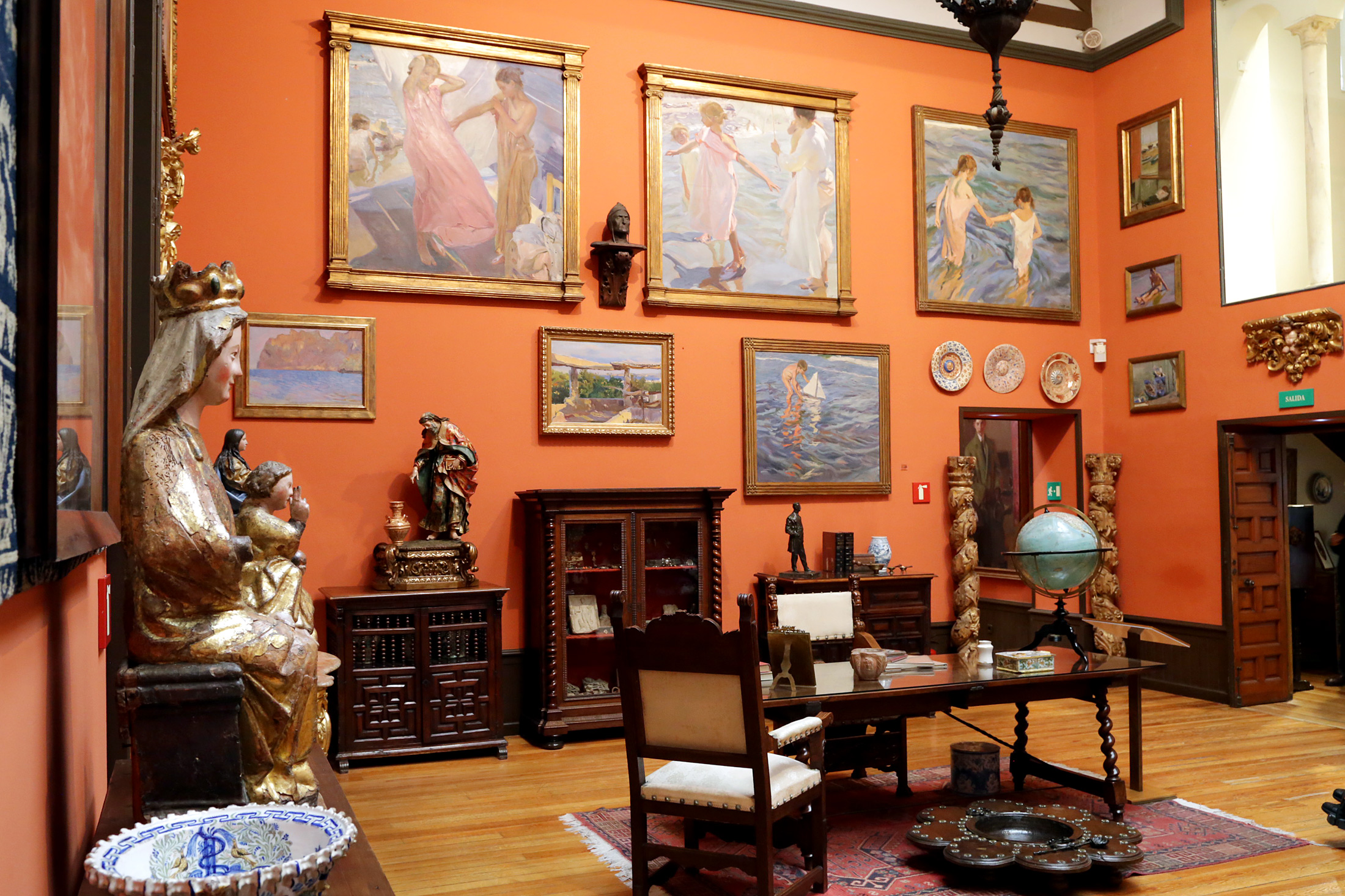 Museo Sorolla de Madrid, interior.